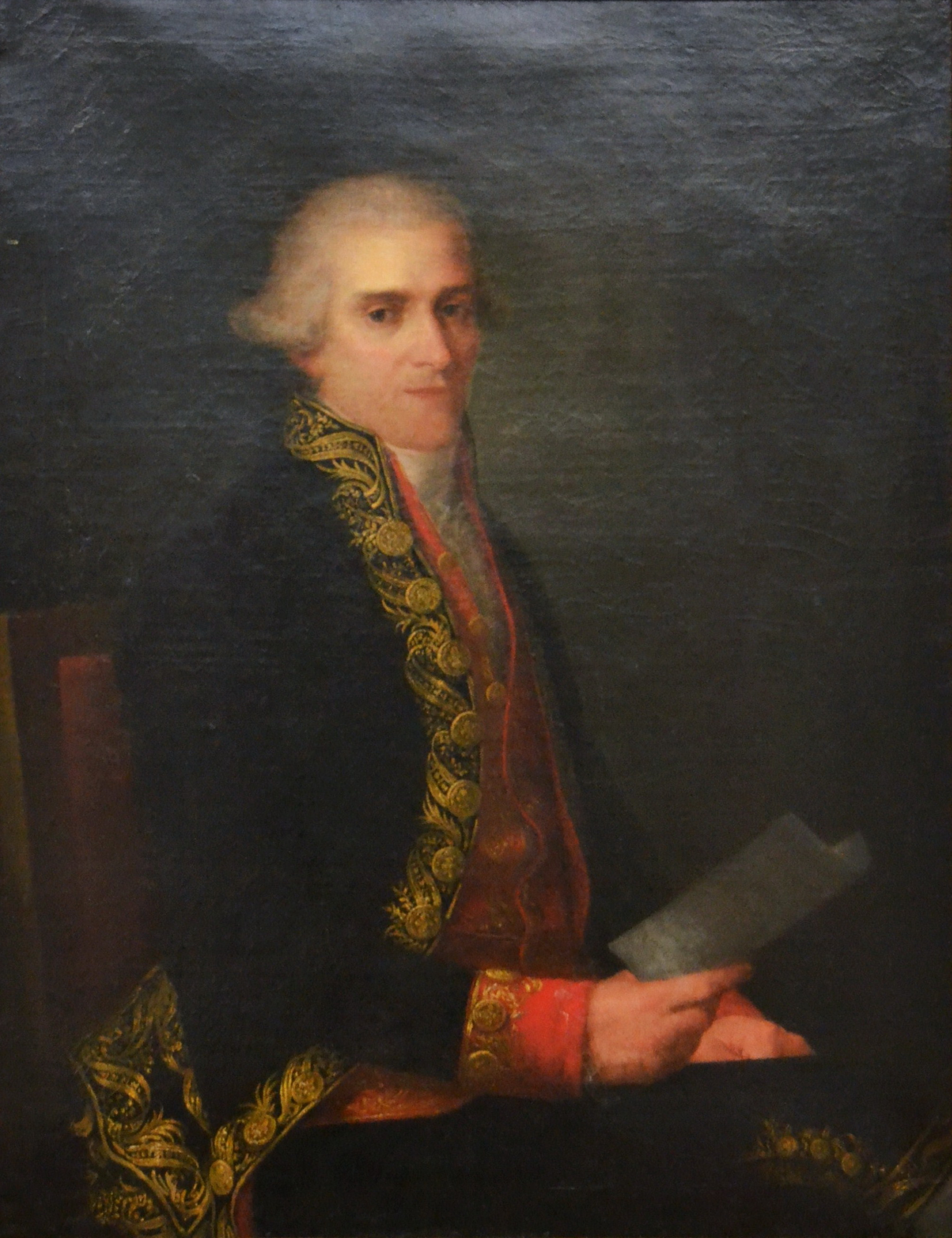 Retrat de l'escultor Josep Esteve i Bonet, Agustí Esteve i Marquès. Oli sobre llenç, 96 x 74,8 cm. Museu de Belles Arts de València.